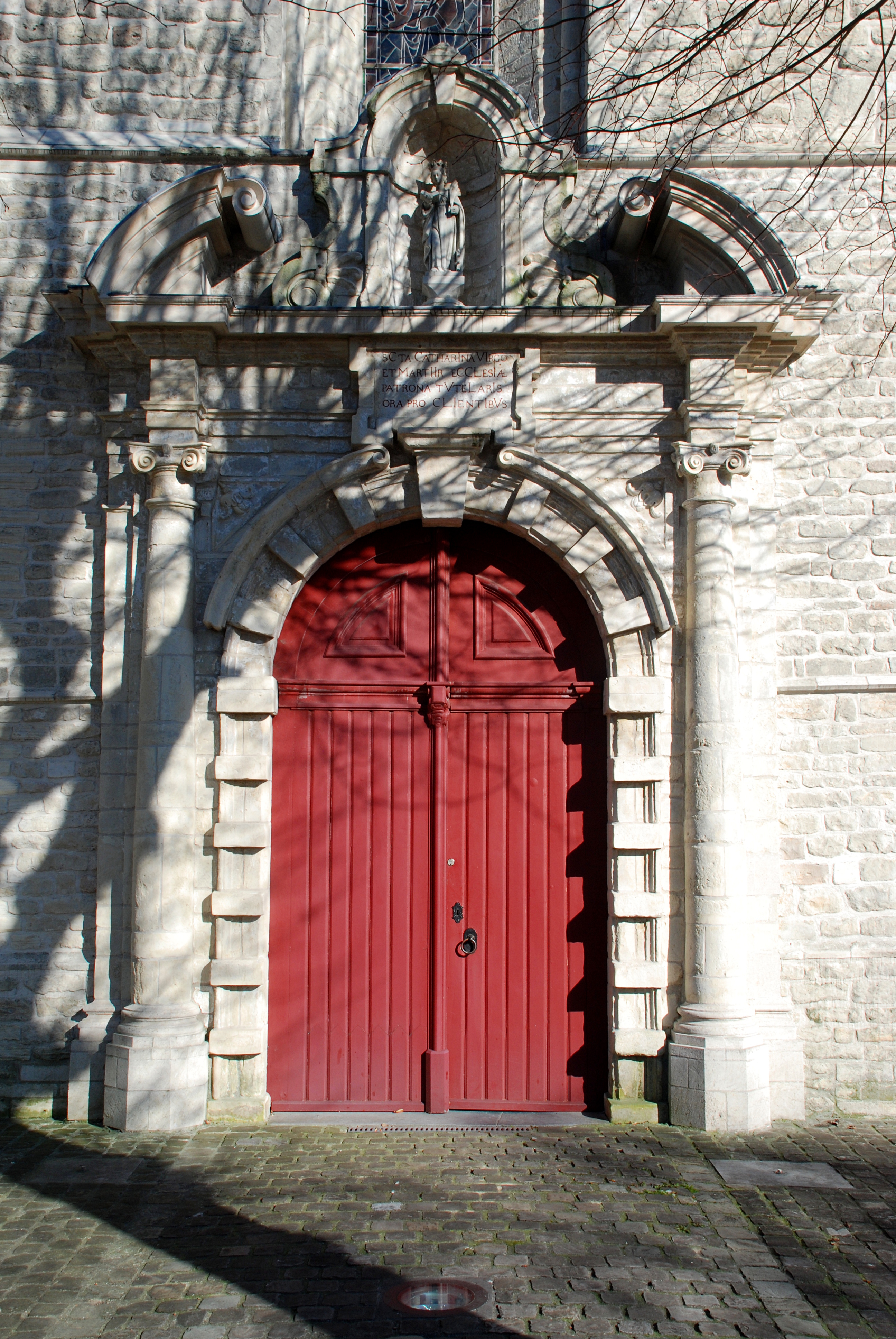 Belgique - Brabant flamand - Steenokkerzeel - Église Sainte-Catherine de Humelgem